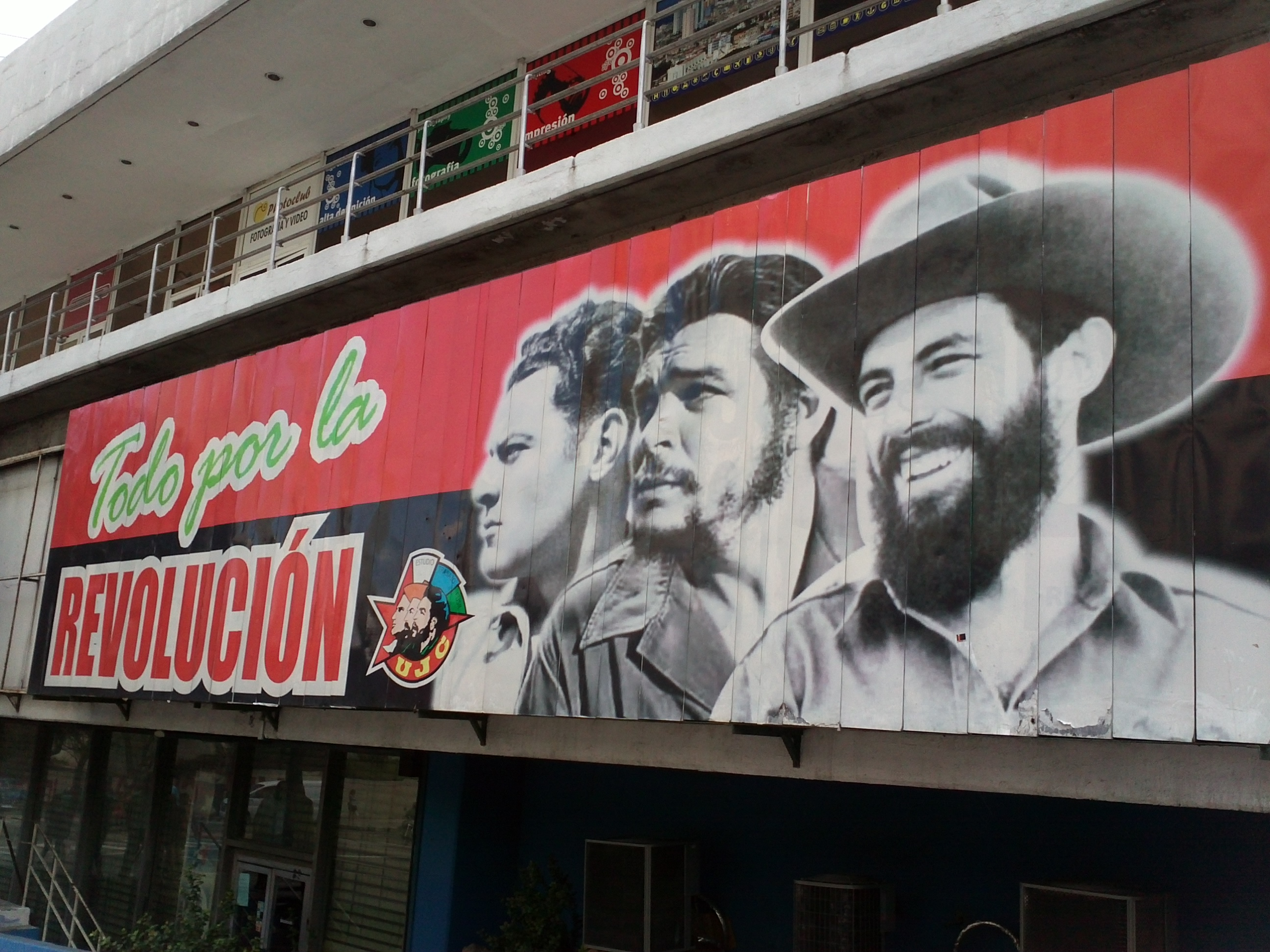 Outdoor em Havana, Cuba, mostrando três heróis da Revolução Cubana. Da esquerda para a direita: Camilo Cienfuegos, Ernesto Che Guevara e Fidel Castro.